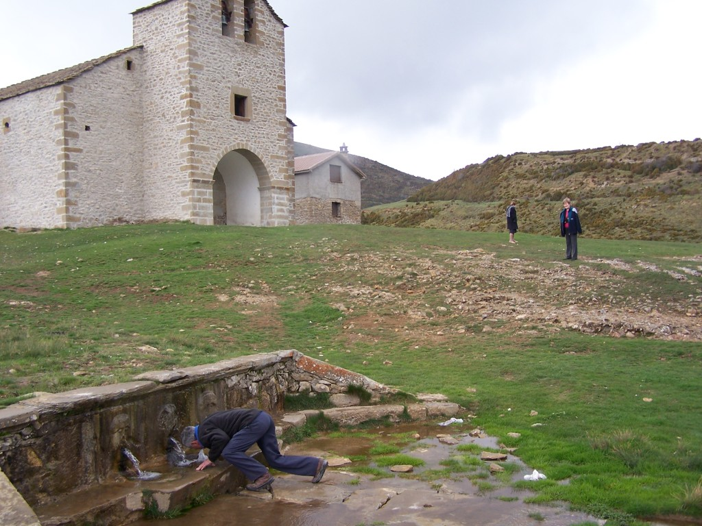 Aragonés: Armita de Santa Orosia